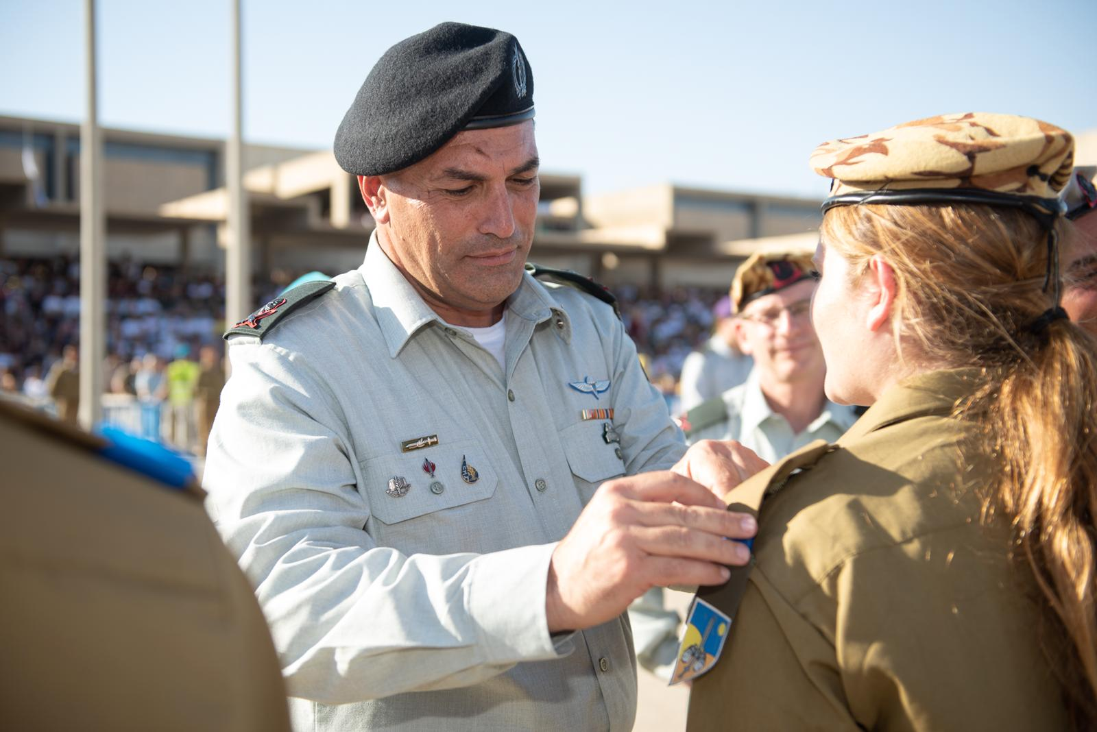 טקס סיום קורס קצינים קרביים אחוד – מחזור 54.